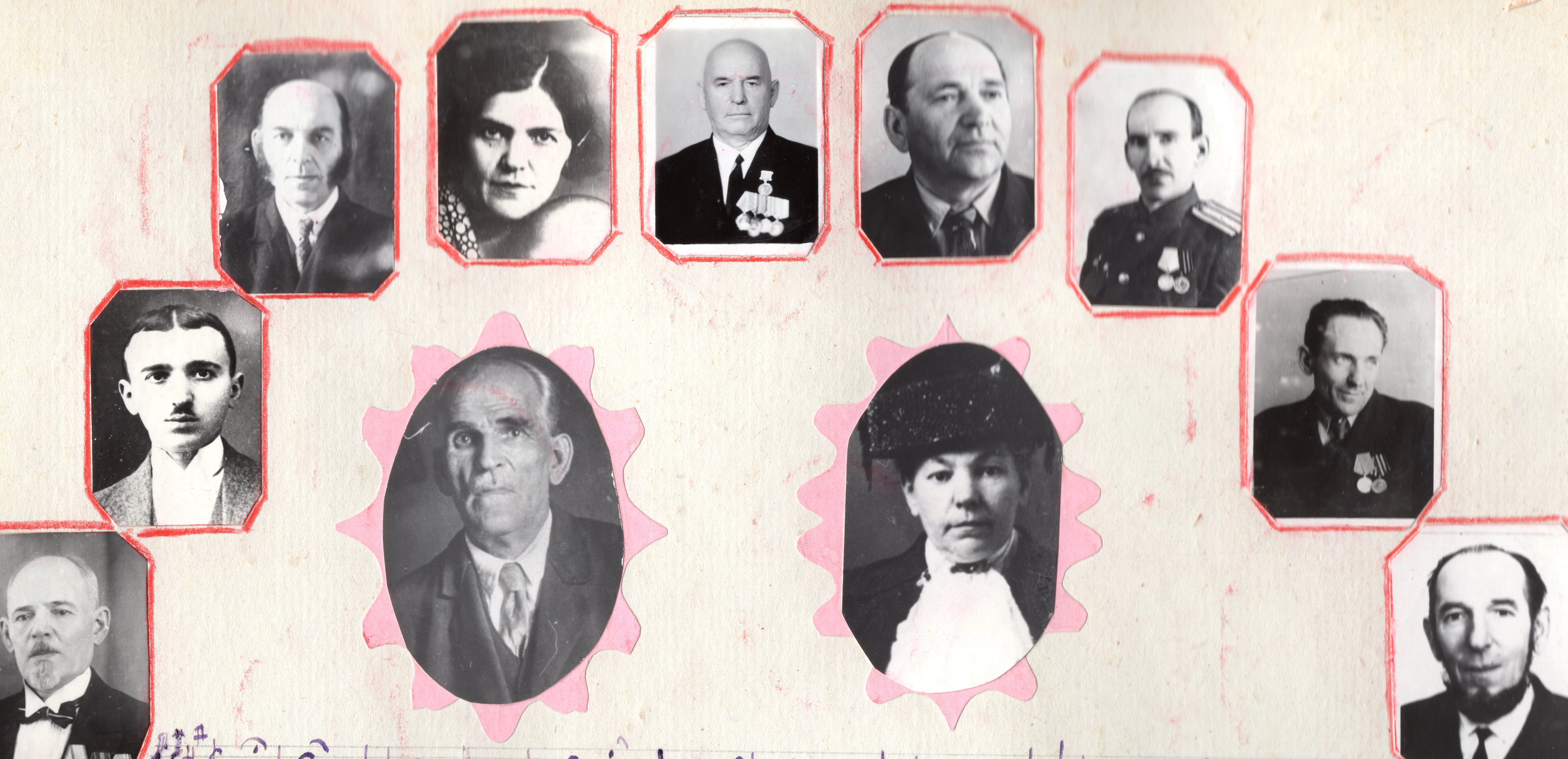 Степан Фёдорович Леонов, его жена и его дети. Фотография из семейного альбома.